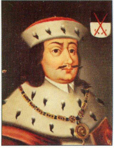 Friedrich II.